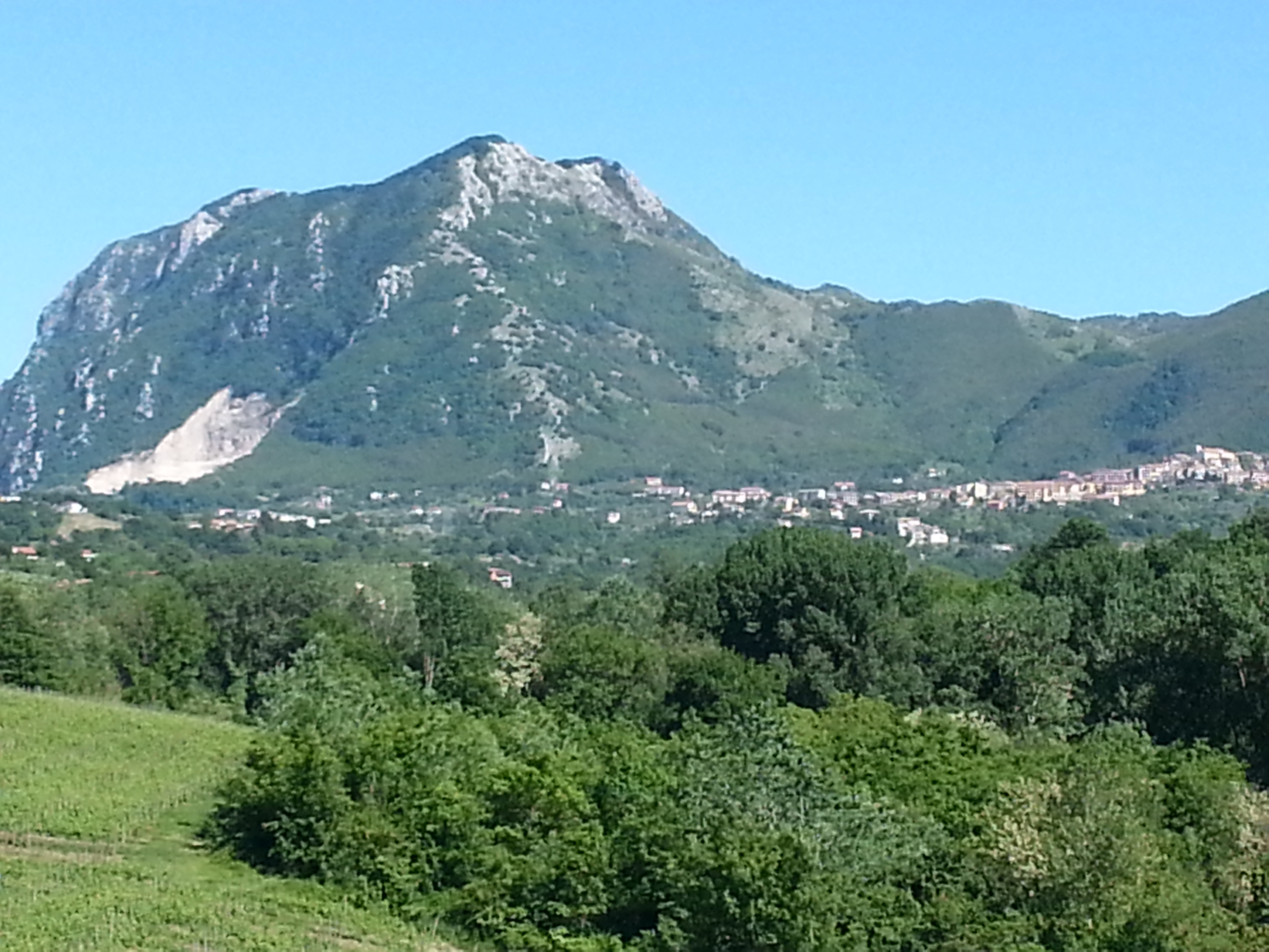 Chiusano di San Domenico (AV) e il monte Tuoro